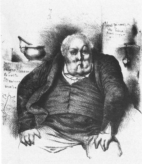 M. Betin le-Veau, caricature of Ingres' 1832 Portrait of Louis-François Bertin